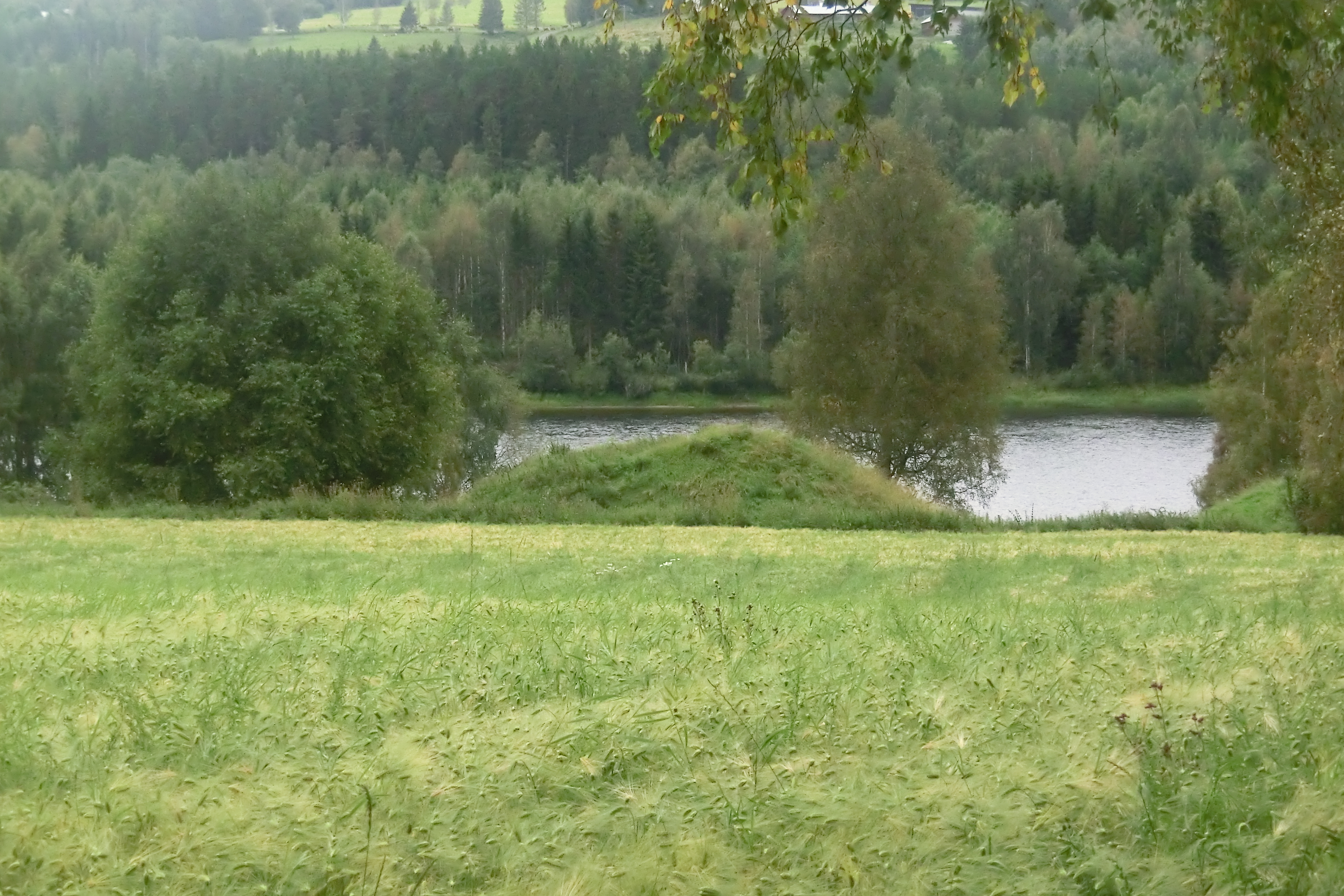 Holms gravfält